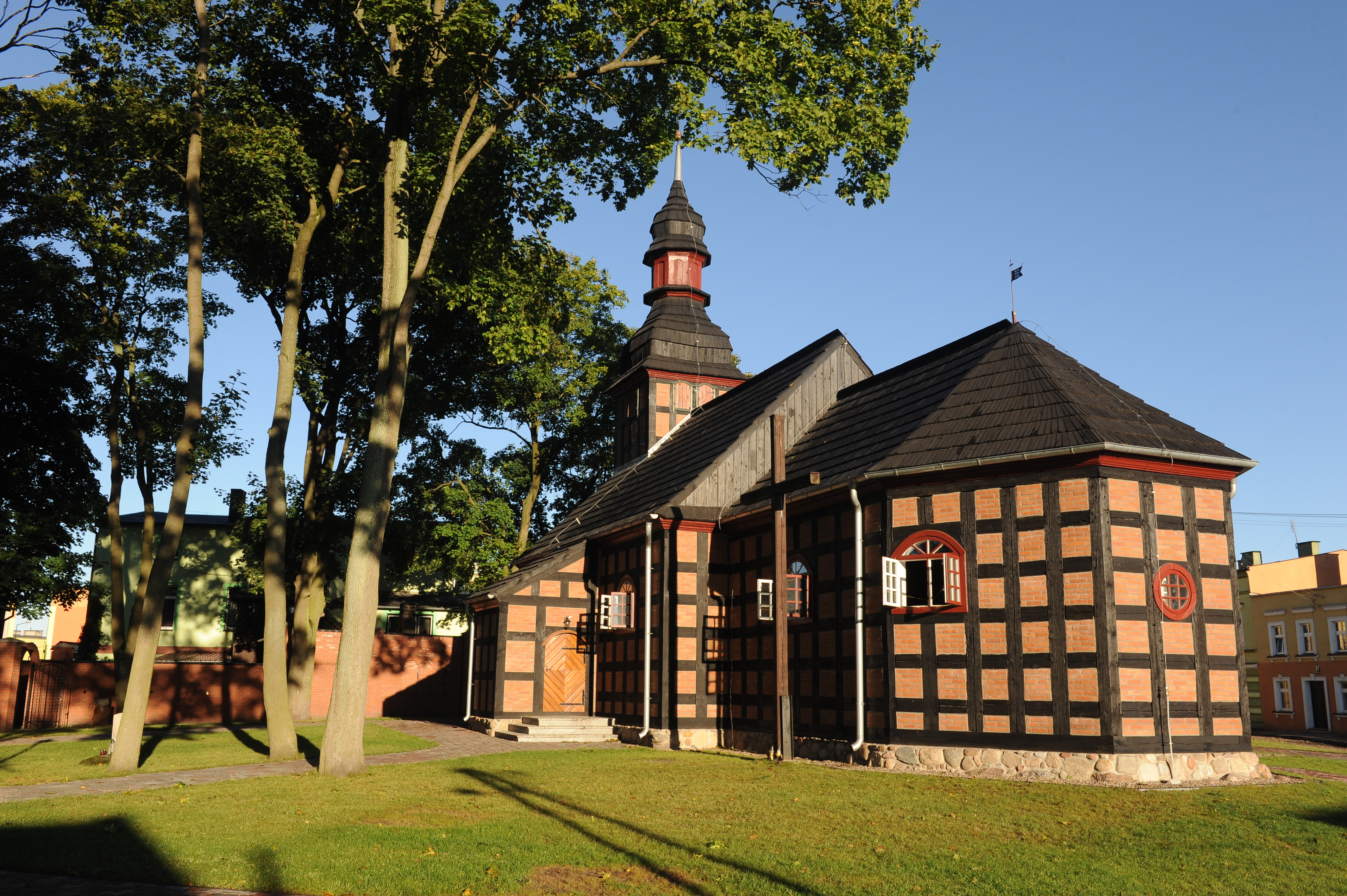 Czarne, kościół par. pw. Wniebowzięcia NMP, 1756